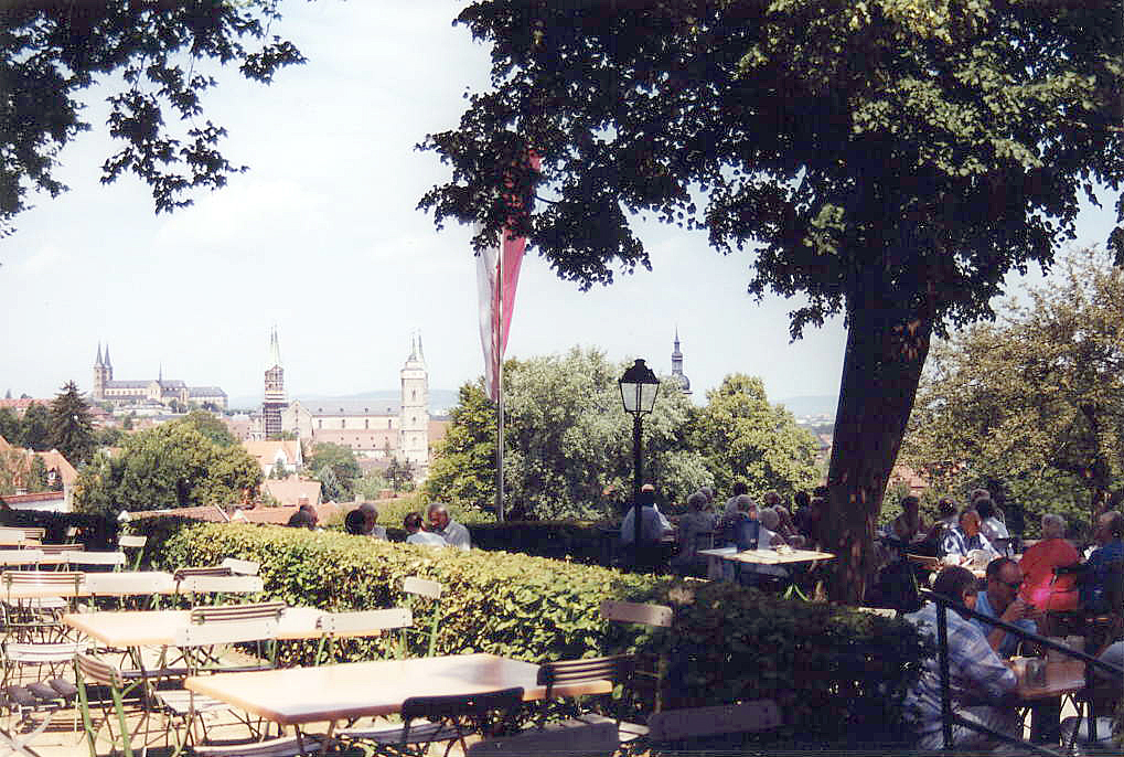 Bierkeller der Brauerei Spezial in Bamberg